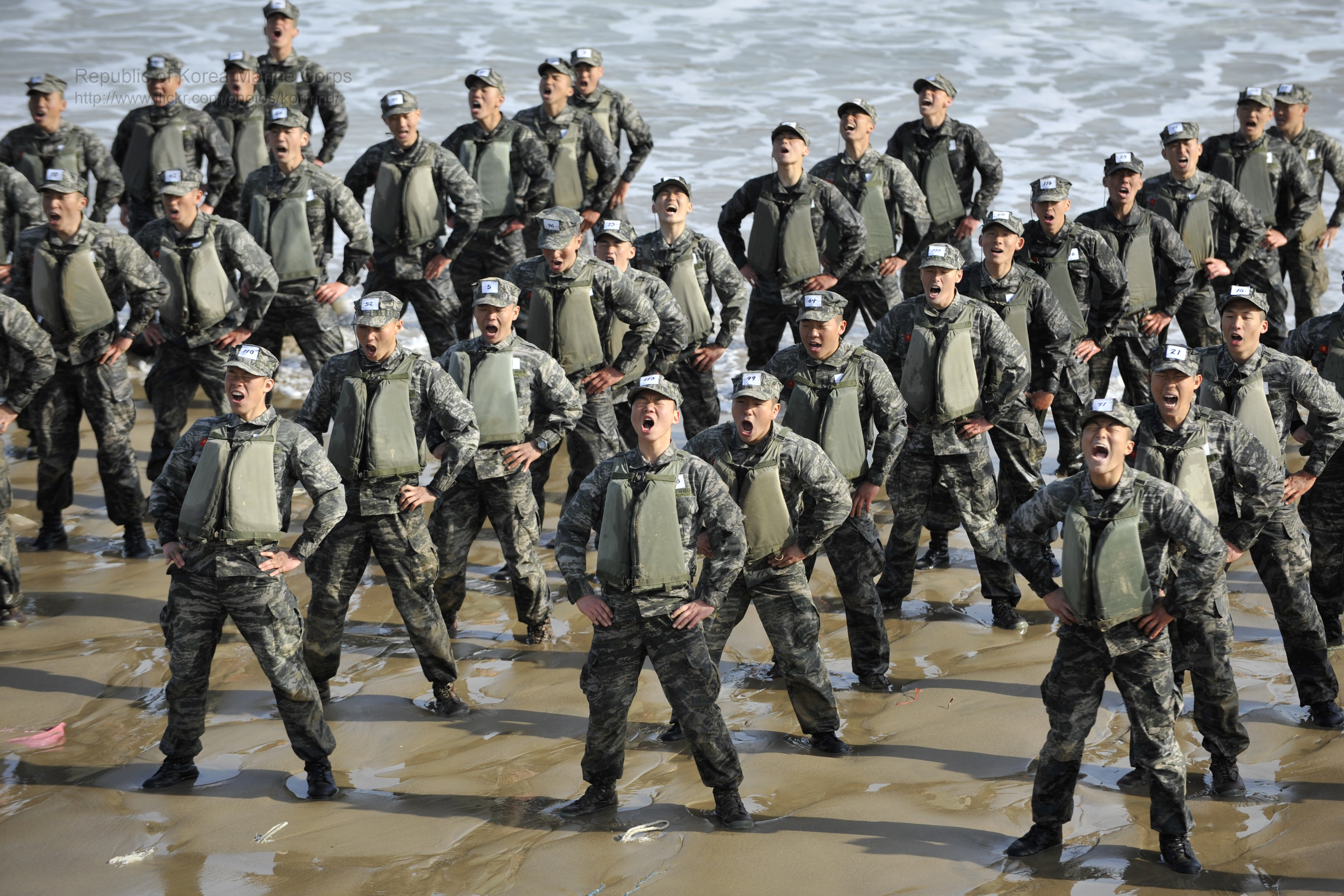 해병대 교육훈련단 특수수색교육 중 체력훈련을 하고 있다. 촬영 - 중사 조정민